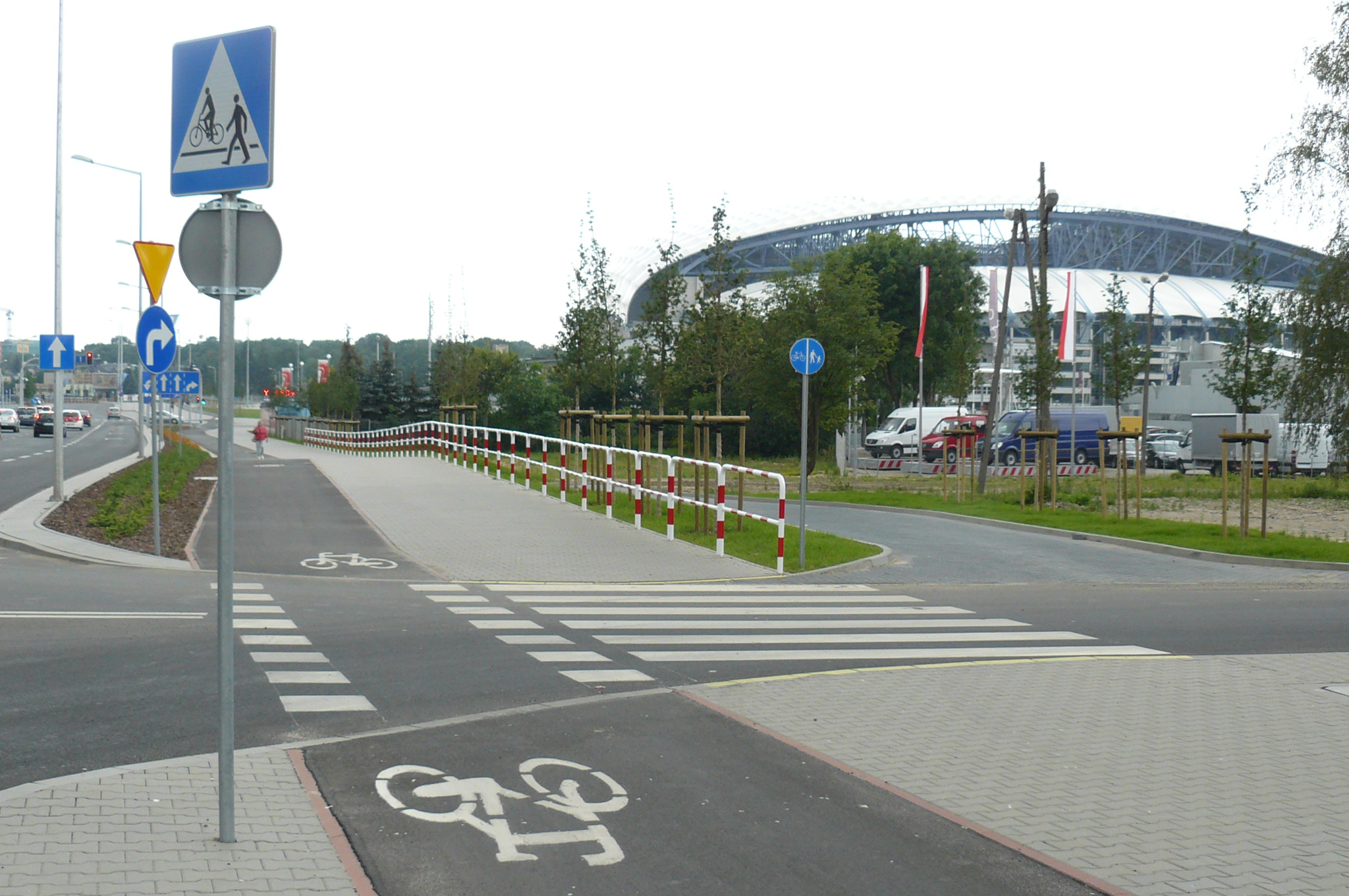 Poznań, ul. Bułgarska.